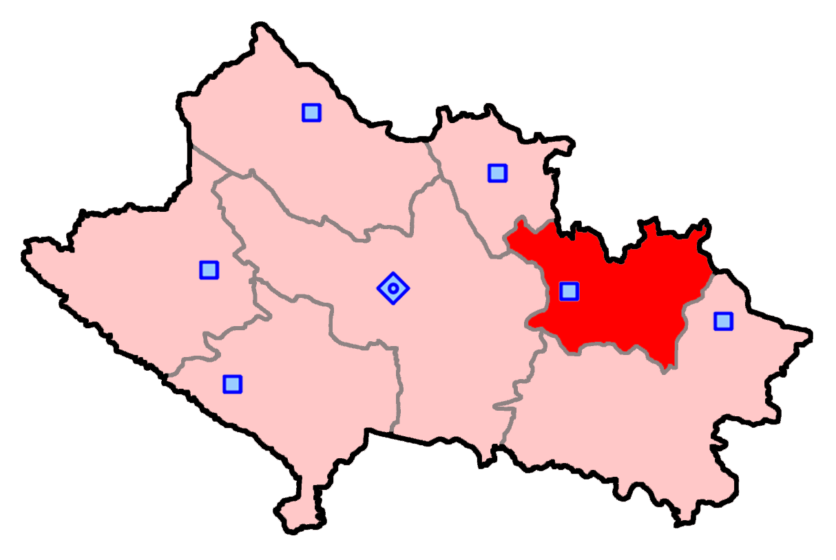 حوزه‌ درود برای انتخابات مجلس شورای اسلامی